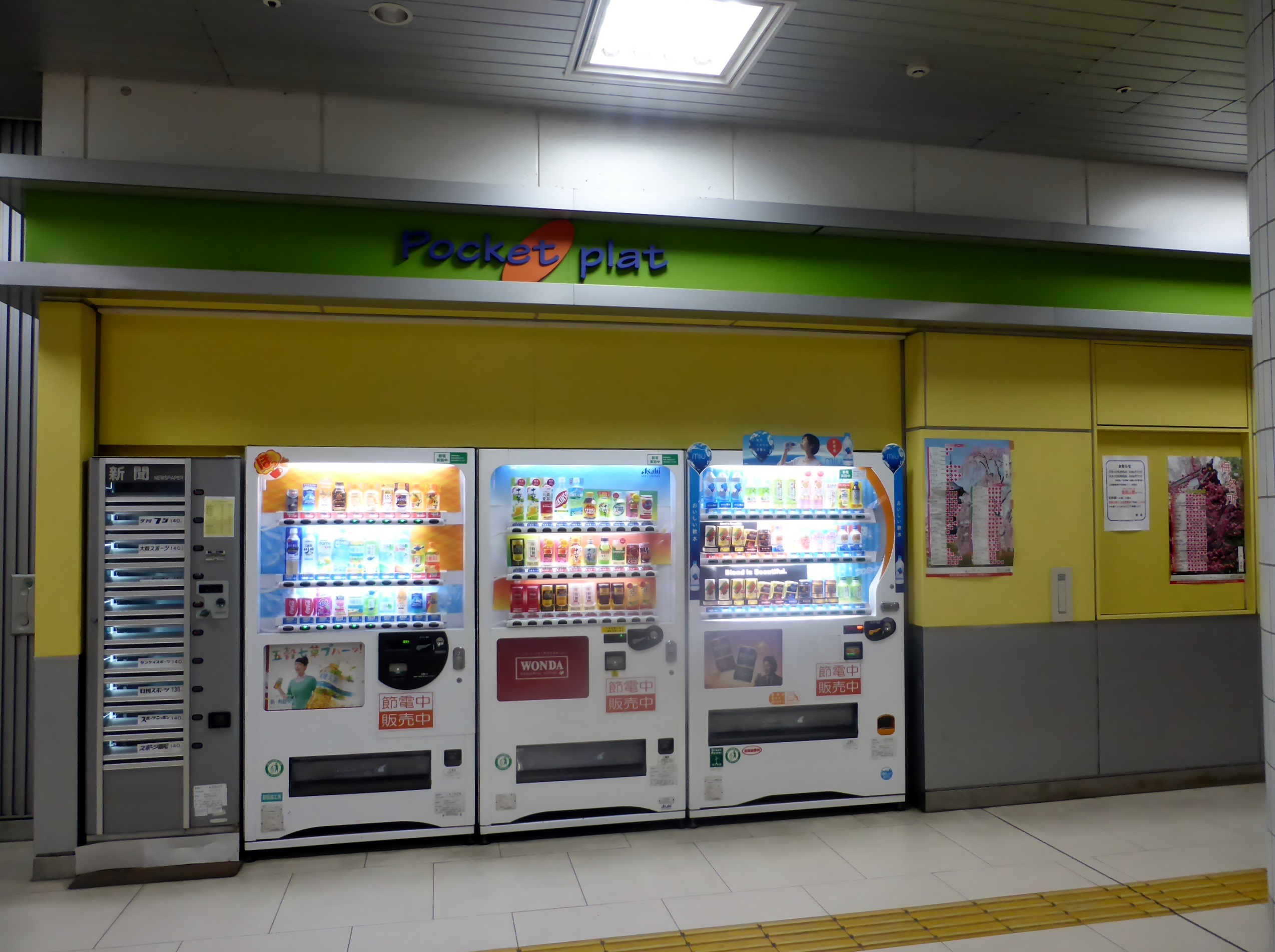 学研北生駒駅構内の自販機（元々はPocket platの売店）を撮影